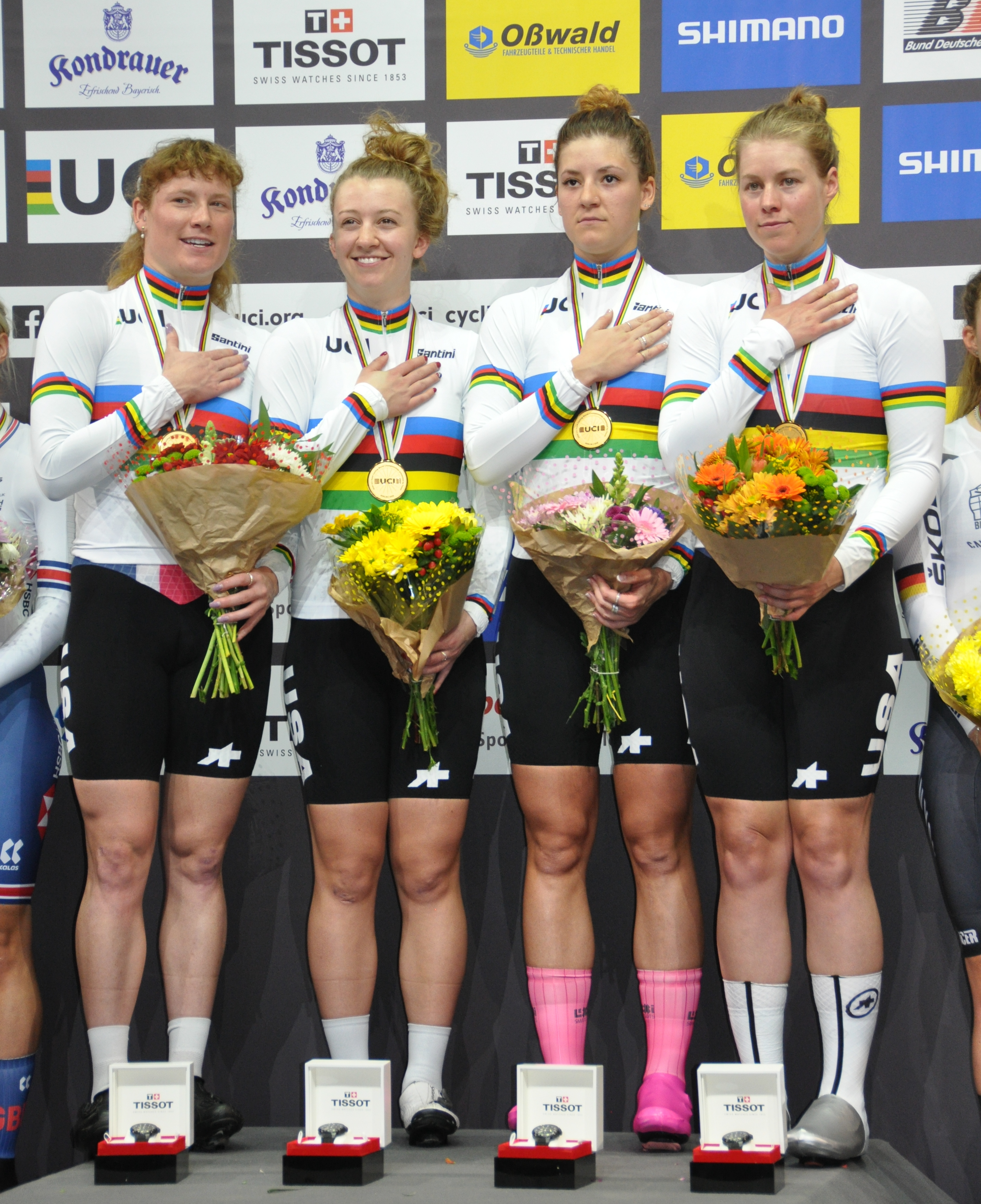 WM-Gold in der Mannschaftsverfolgung (USA): Lily Williams, Emma White, Chloé Dygert, Jennifer Valente